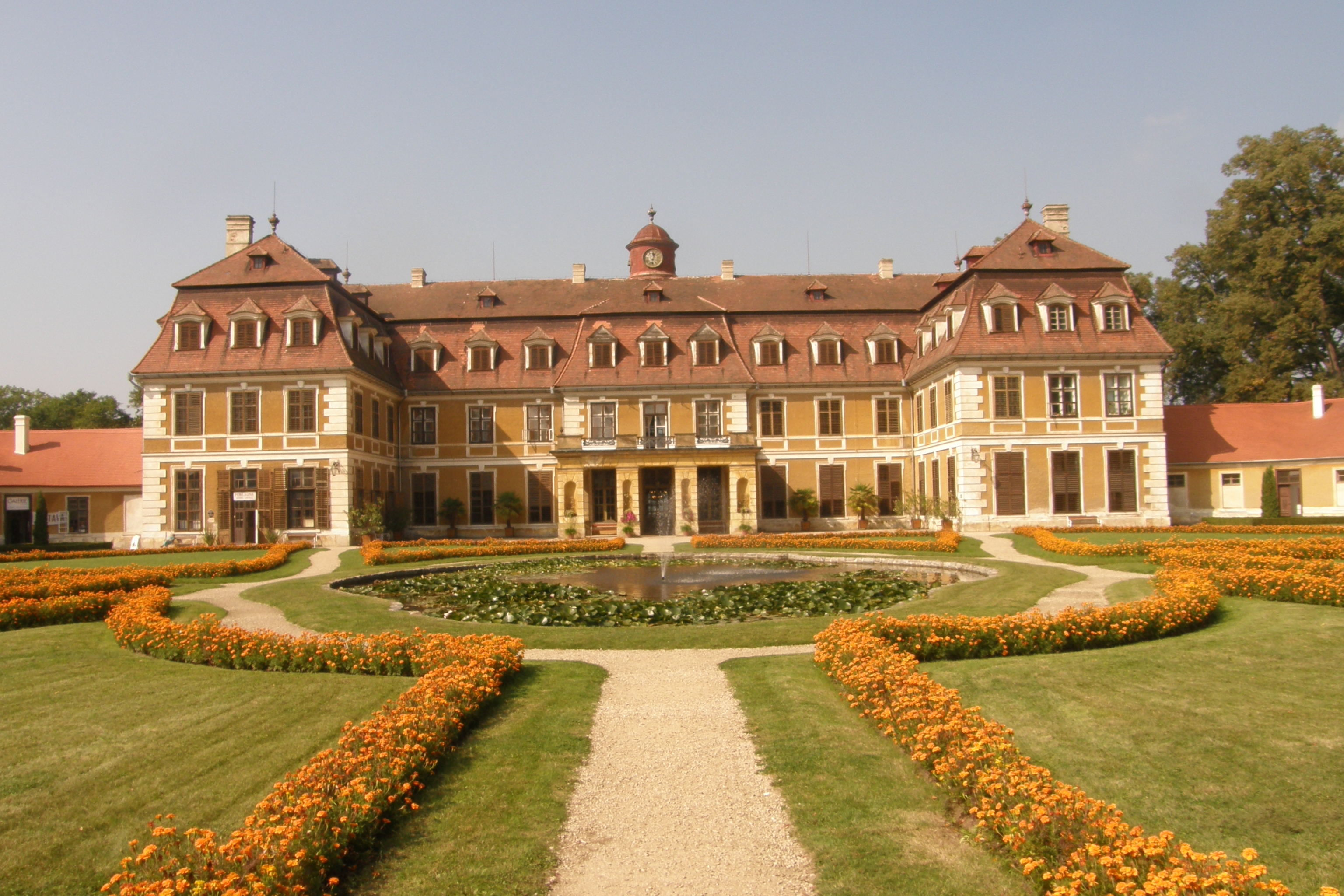 Zámek Rájec, Blanenská 1, Rájec